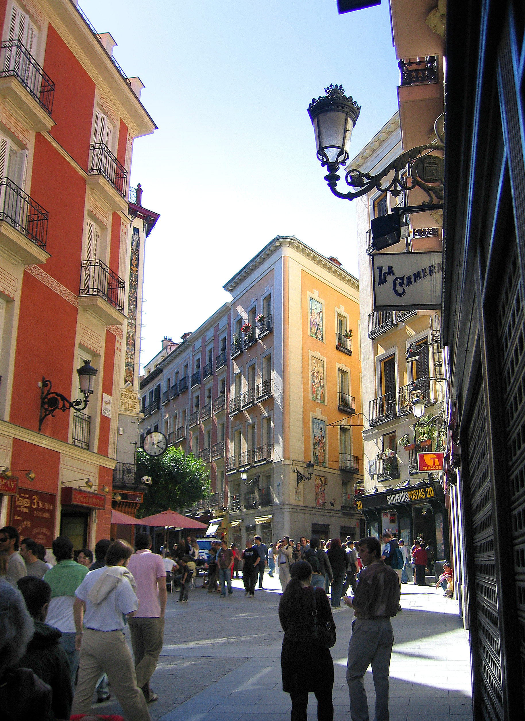 2006. Calle de Postas